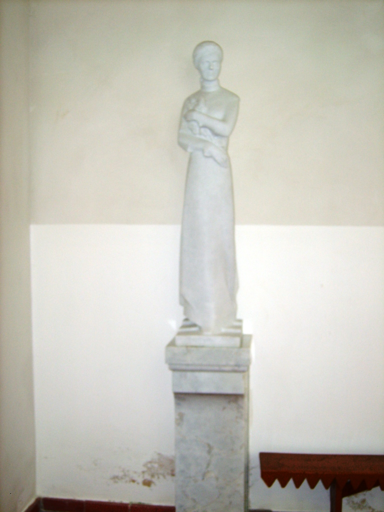 M. Pečkauskaitės skulptūra Židikų koplyčioje